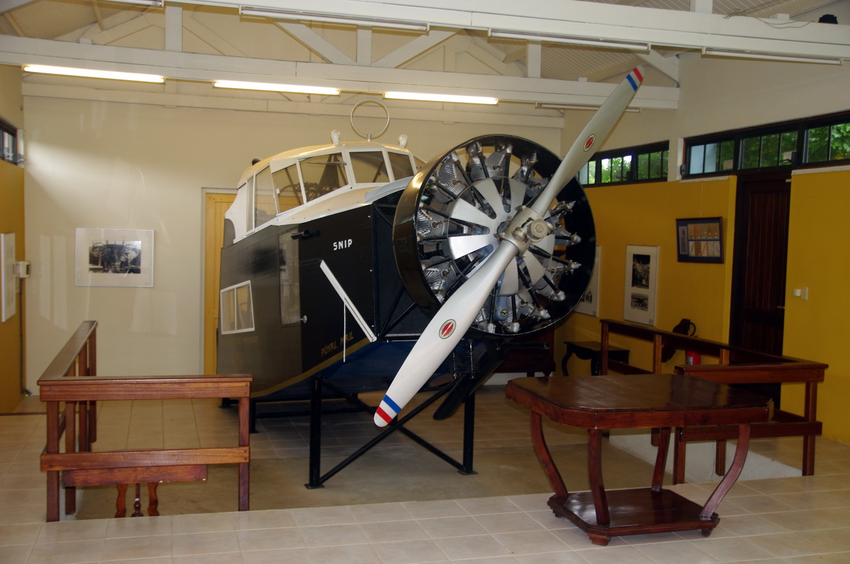 Kabine der Fokker Snip, Museum Curaçao